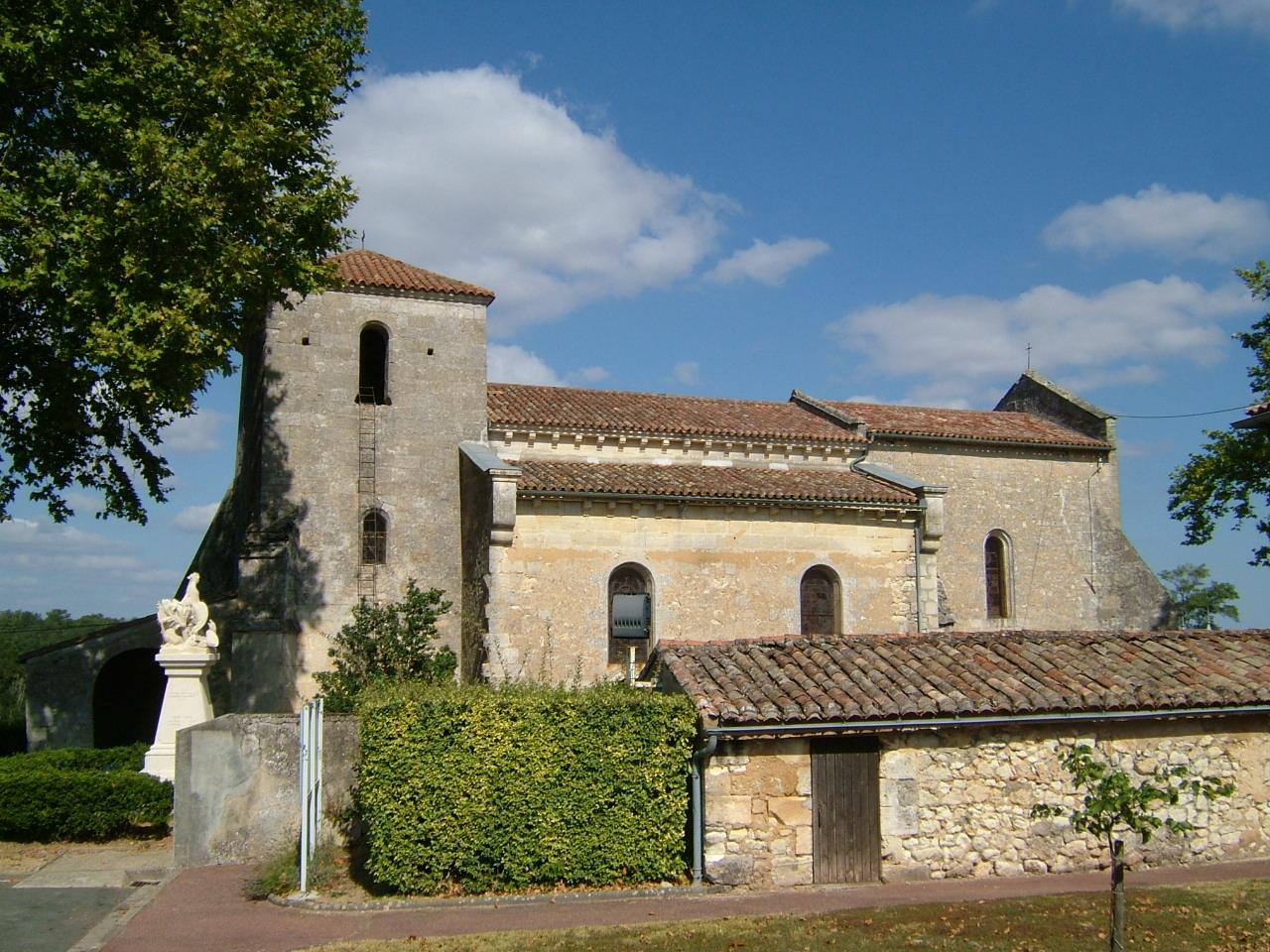 Samonac, Gironde (France); église Saint Martin vue du sud.